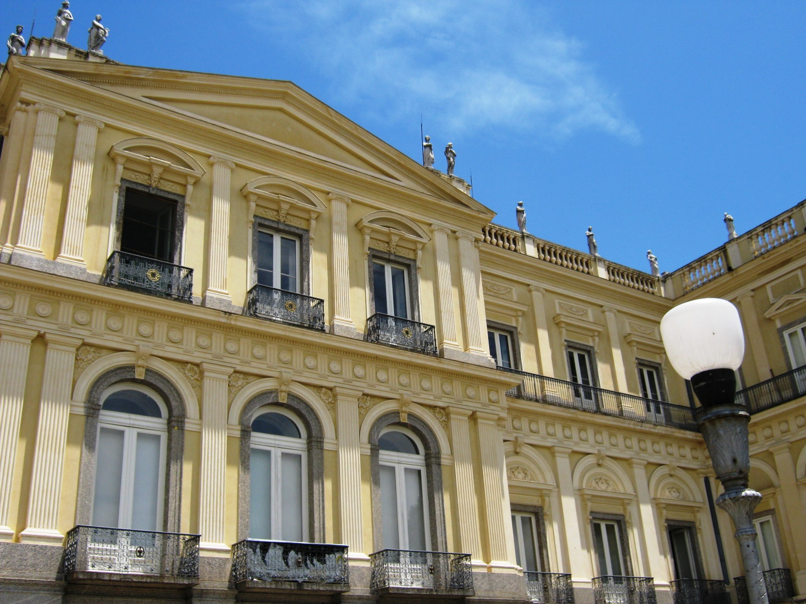 Foto do Museu Nacional da UFRJ, no Paço de São Cristóvão, Rio de Janeiro, Brasil.